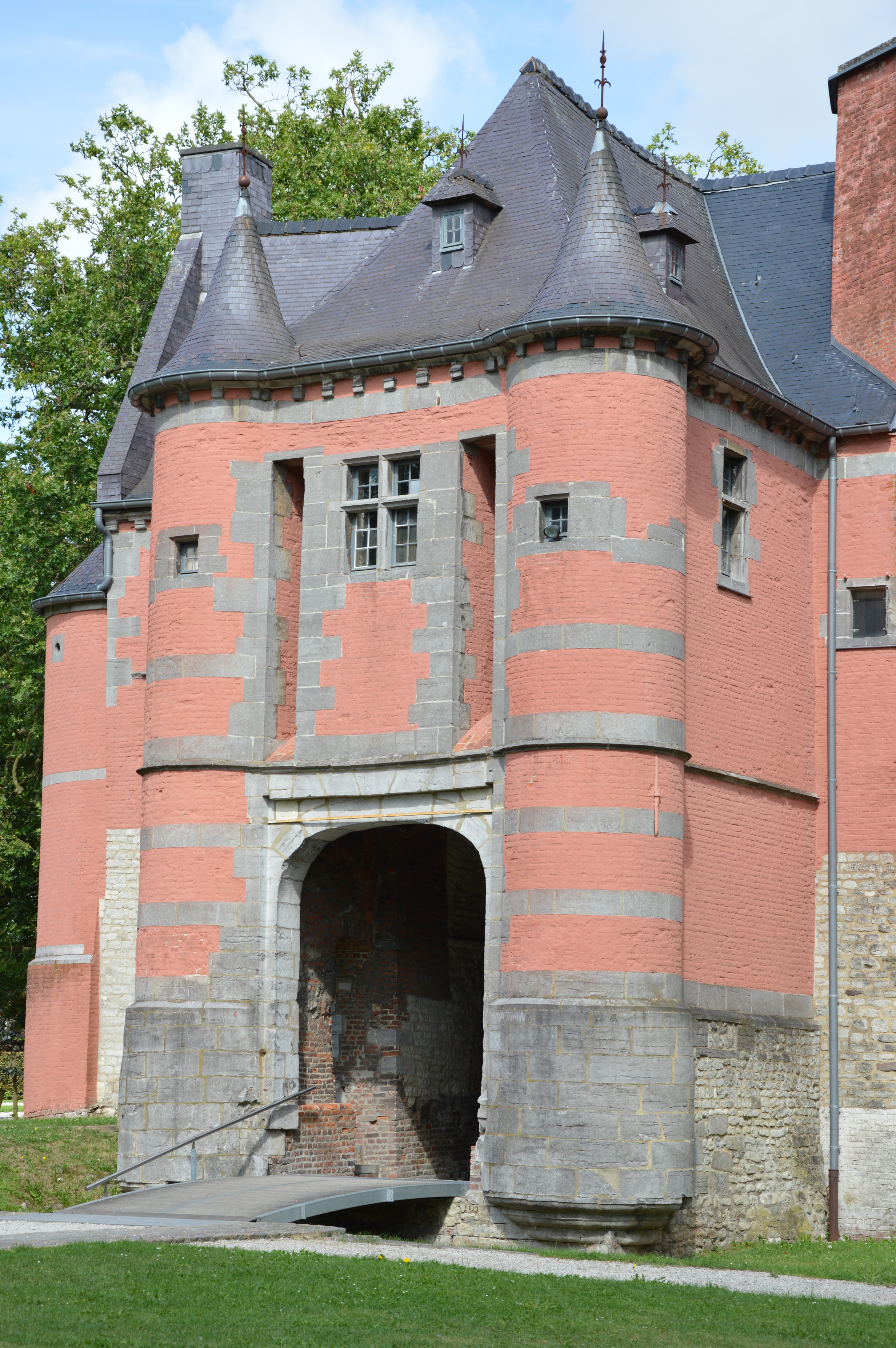 Châtelet d'entrée, vue d'ensemble